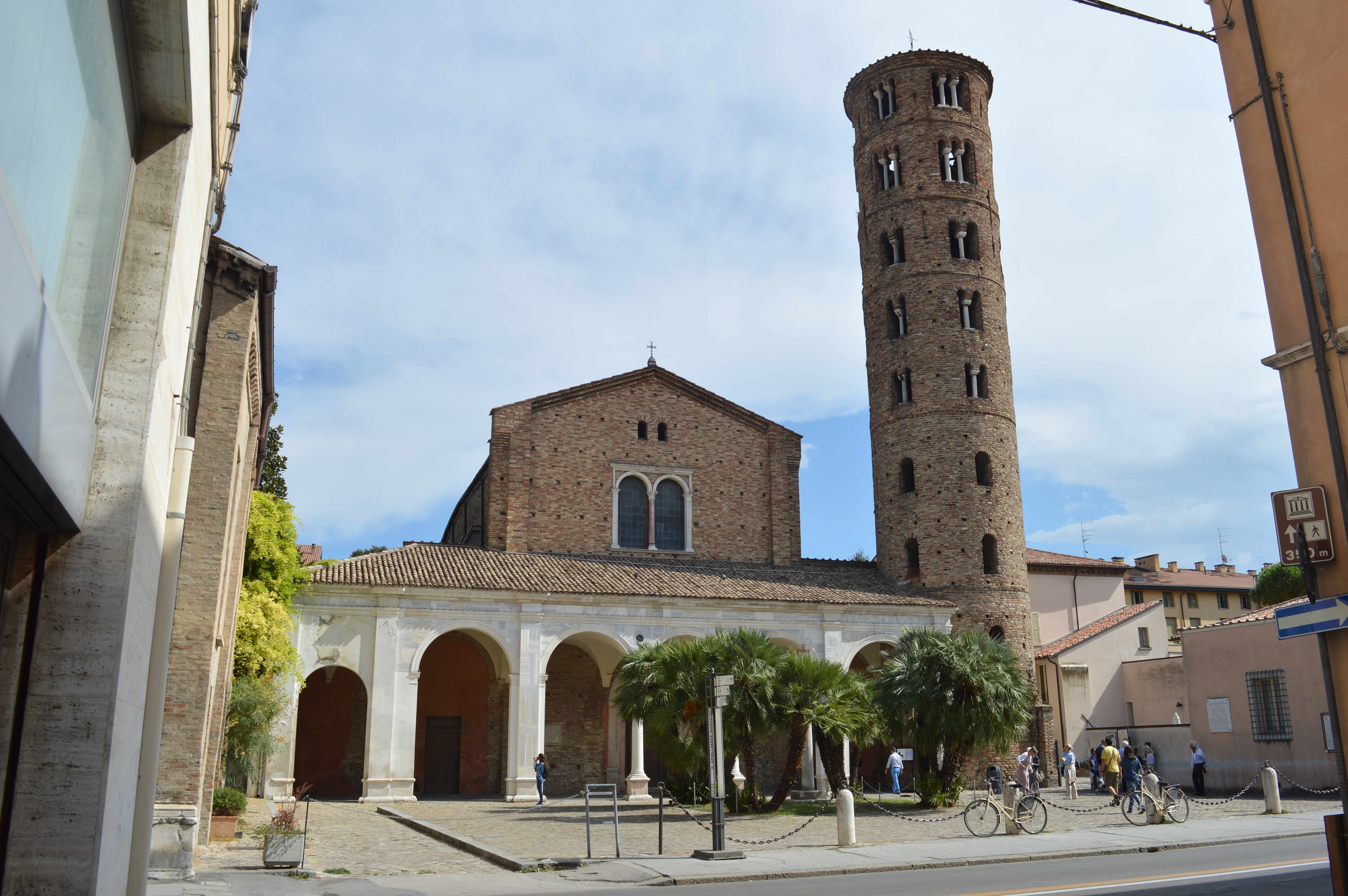 Basilica di Sant'Apollinare Nuovo This is a photo of a monument which is part of cultural heritage of Italy.